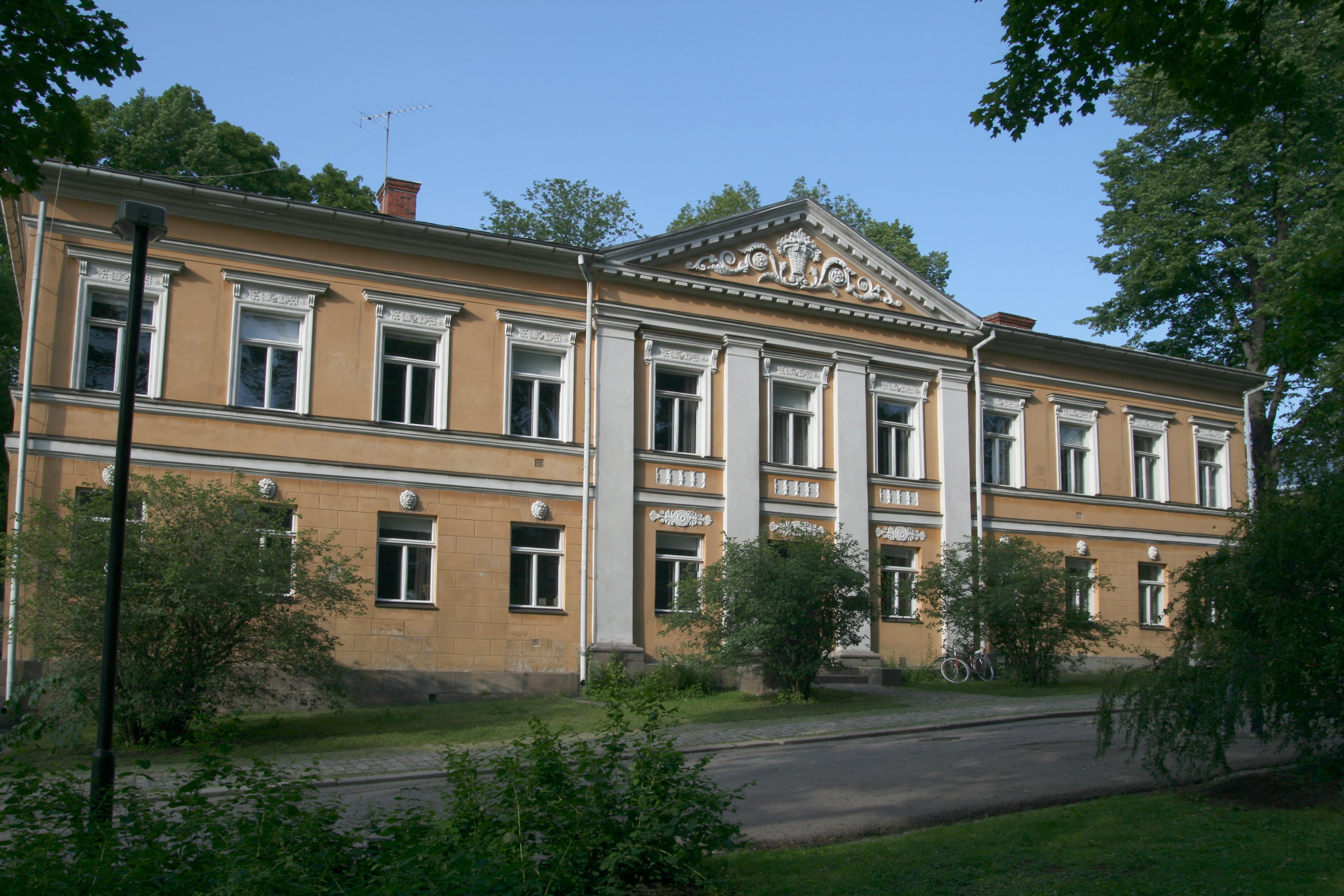 Åbo Akademi's building Domvillan